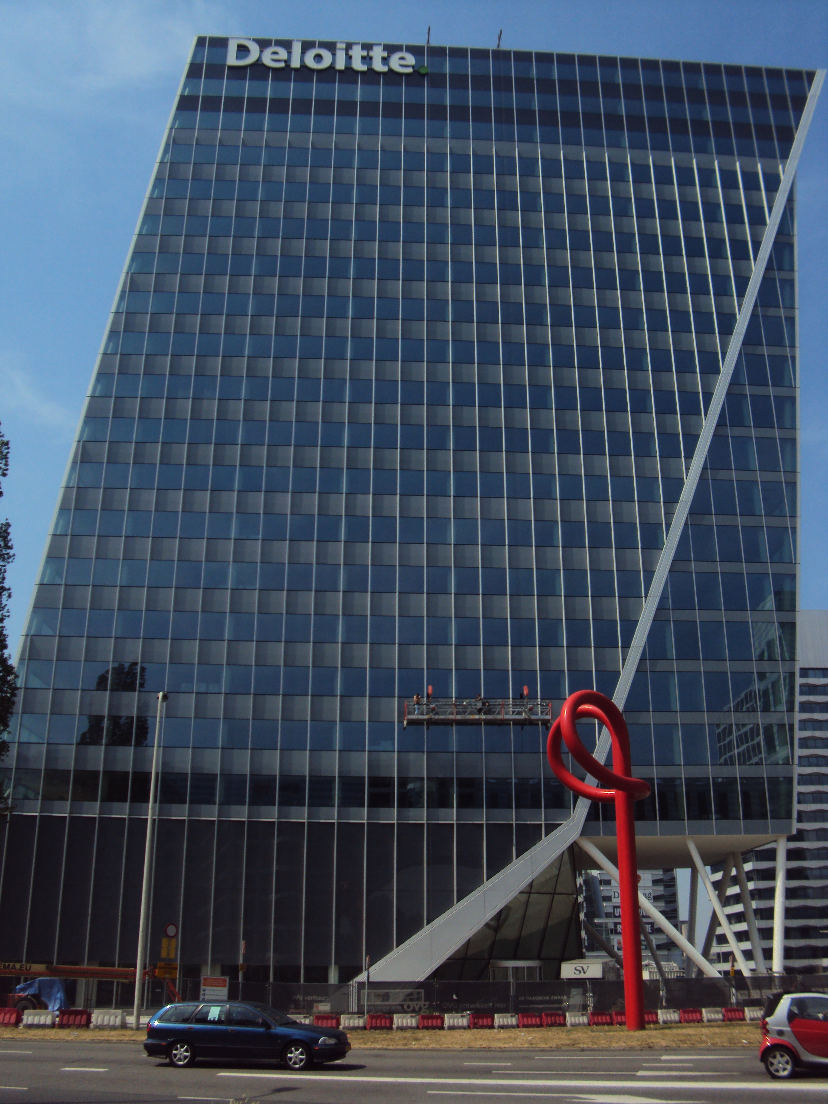 De Haagsche Zwaan op 9 juli 2010.